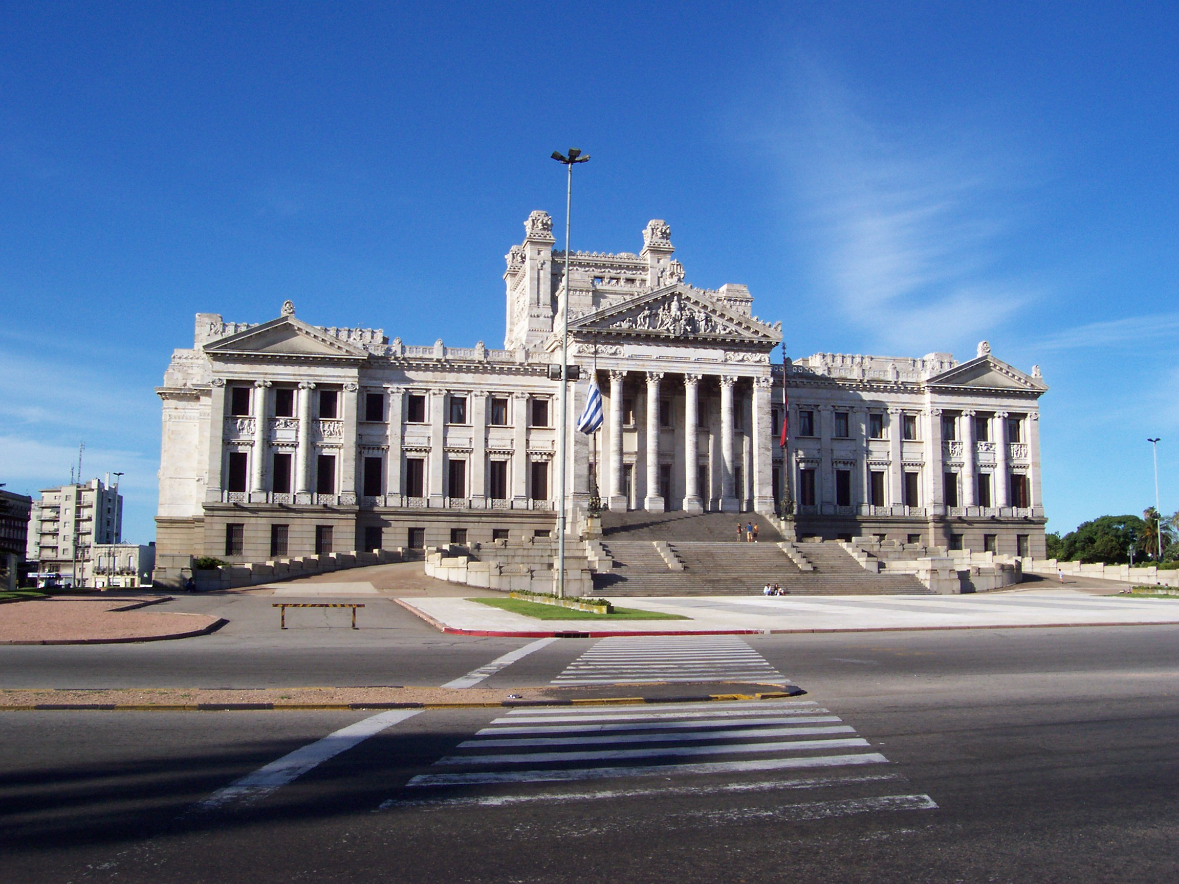 Fachada del Palacio Legistativo, Montevideo, Uruguay. Autor: Federico Corral aka Shant